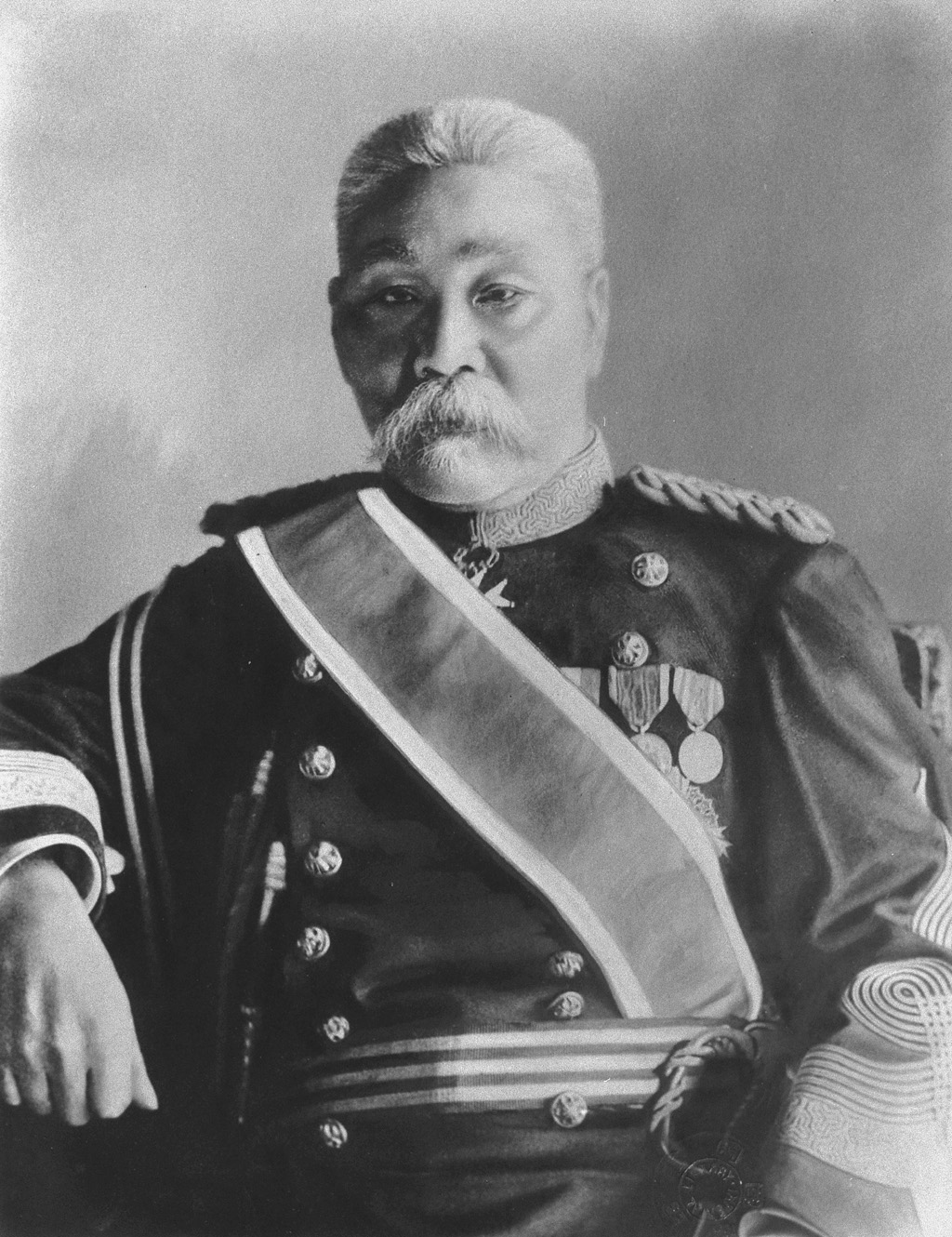 Portrait of Takashima Tomonosuke (高島鞆之助, 1844 – 1916)